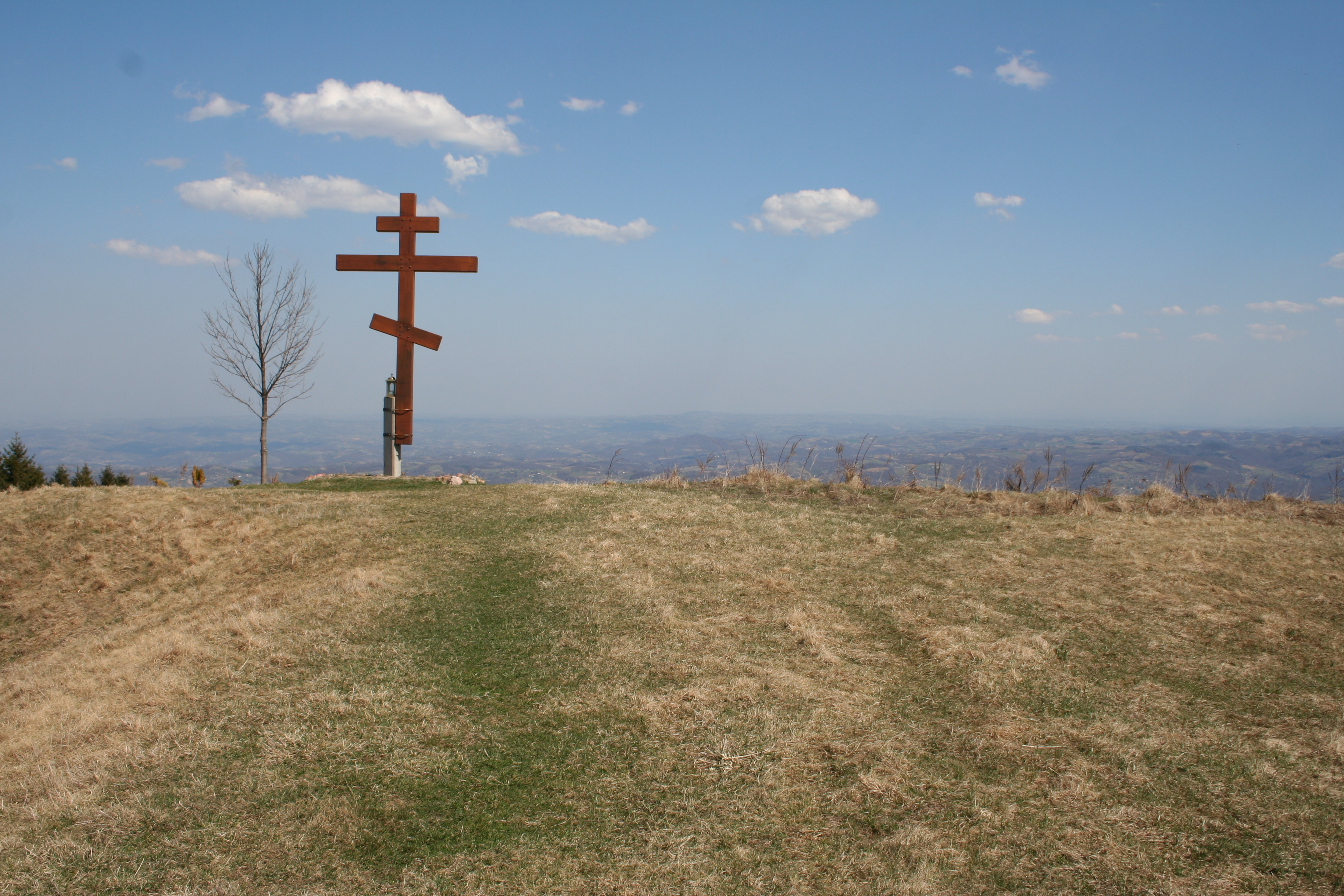 Sokolska planina, vrh Rožanj (973m.n.v) i pogled sa vrha